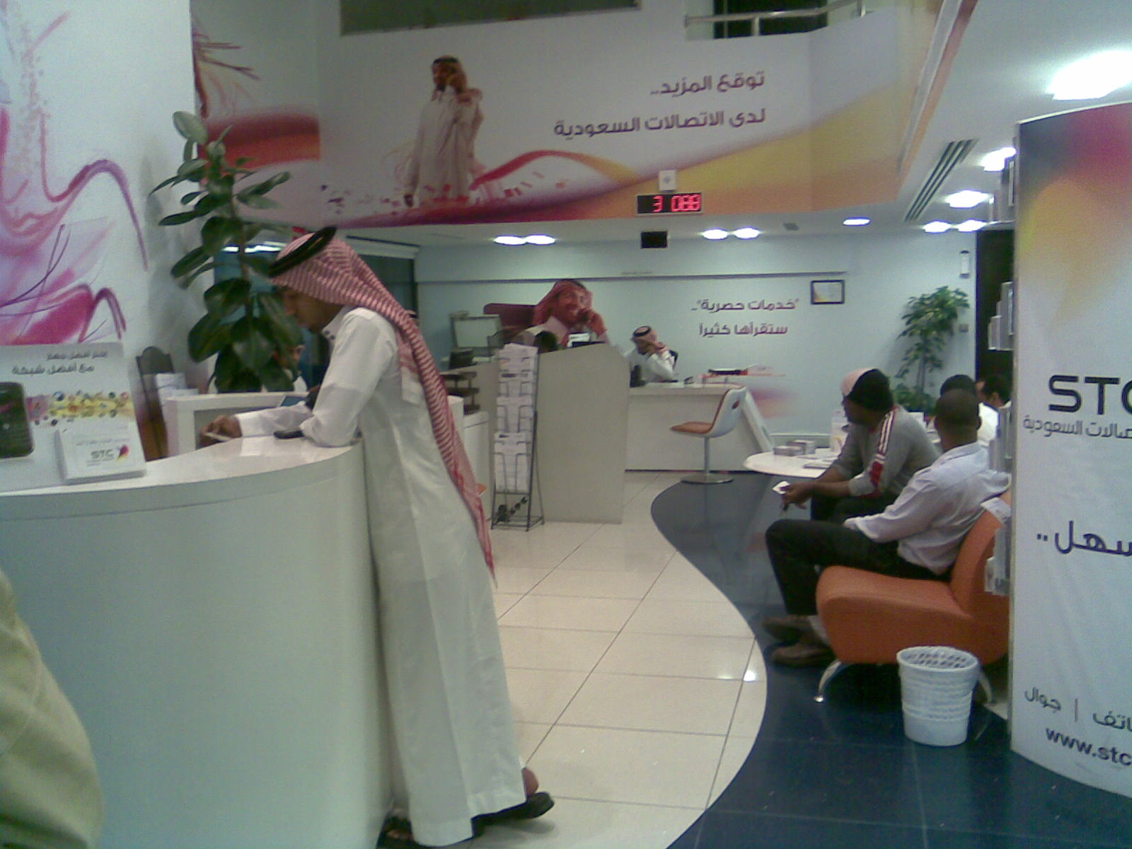 സൗദി ടെലികോം കമ്പനിയുടെ ജിദ്ദ ജമ്ജൂം സെന്ററിലെ ശാഖ